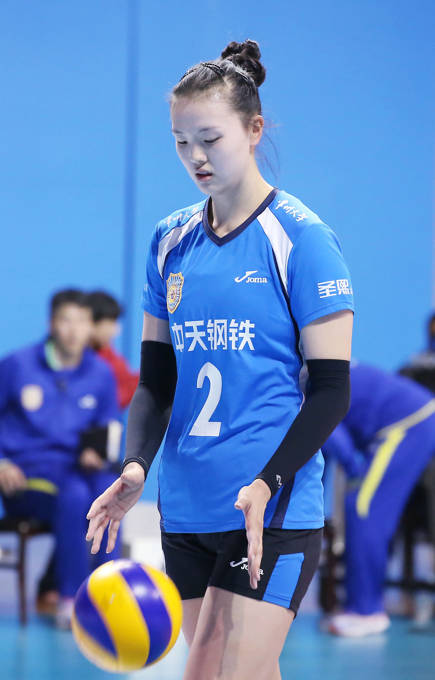 2017.3.11 常州武进体育馆 总决赛第二场 江苏3:0浙江